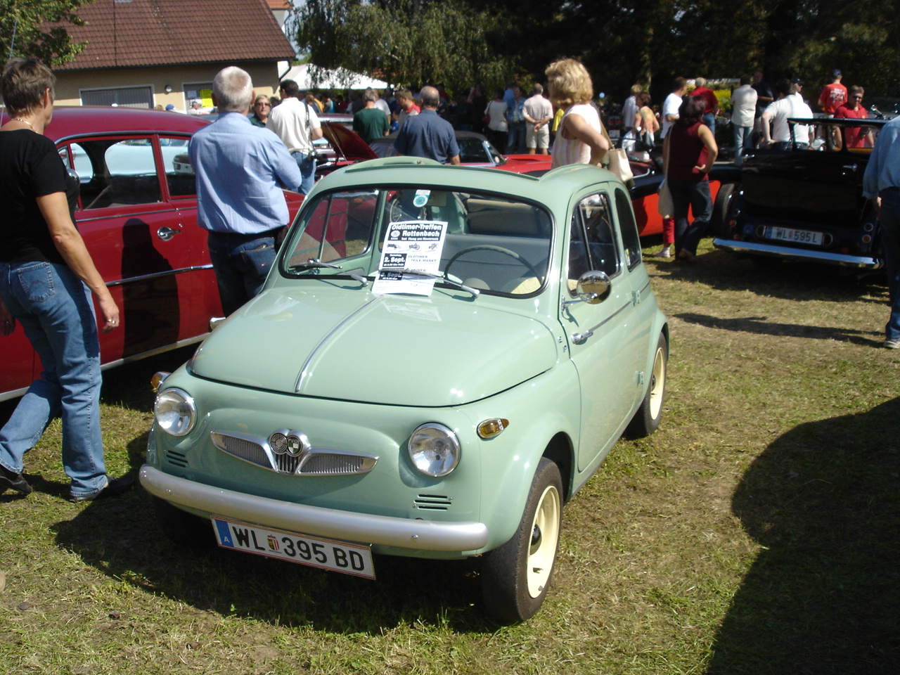 Puch 500 in grün.